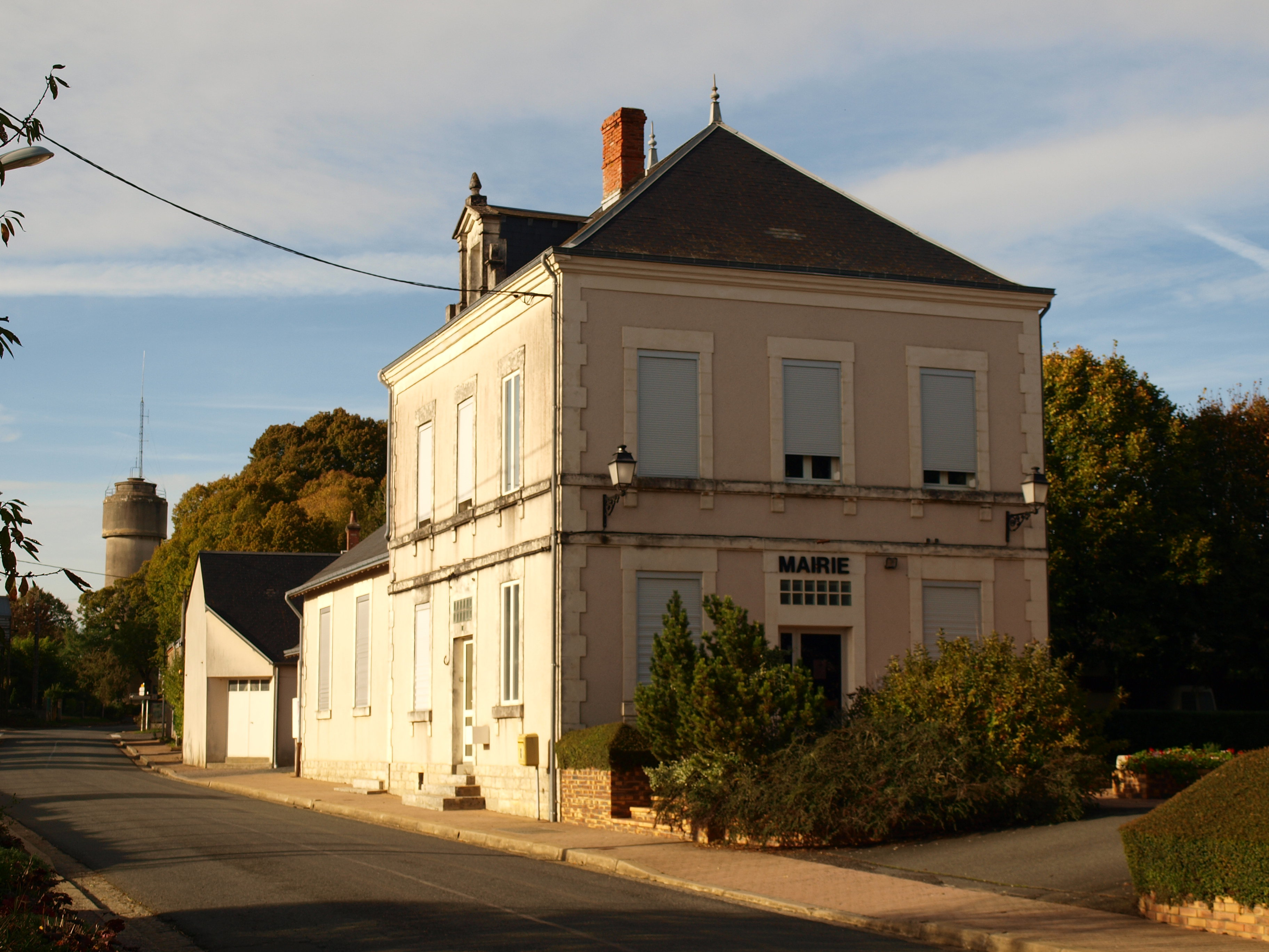 Ménétréols-sous-Vatan (Indre, France) ; mairie